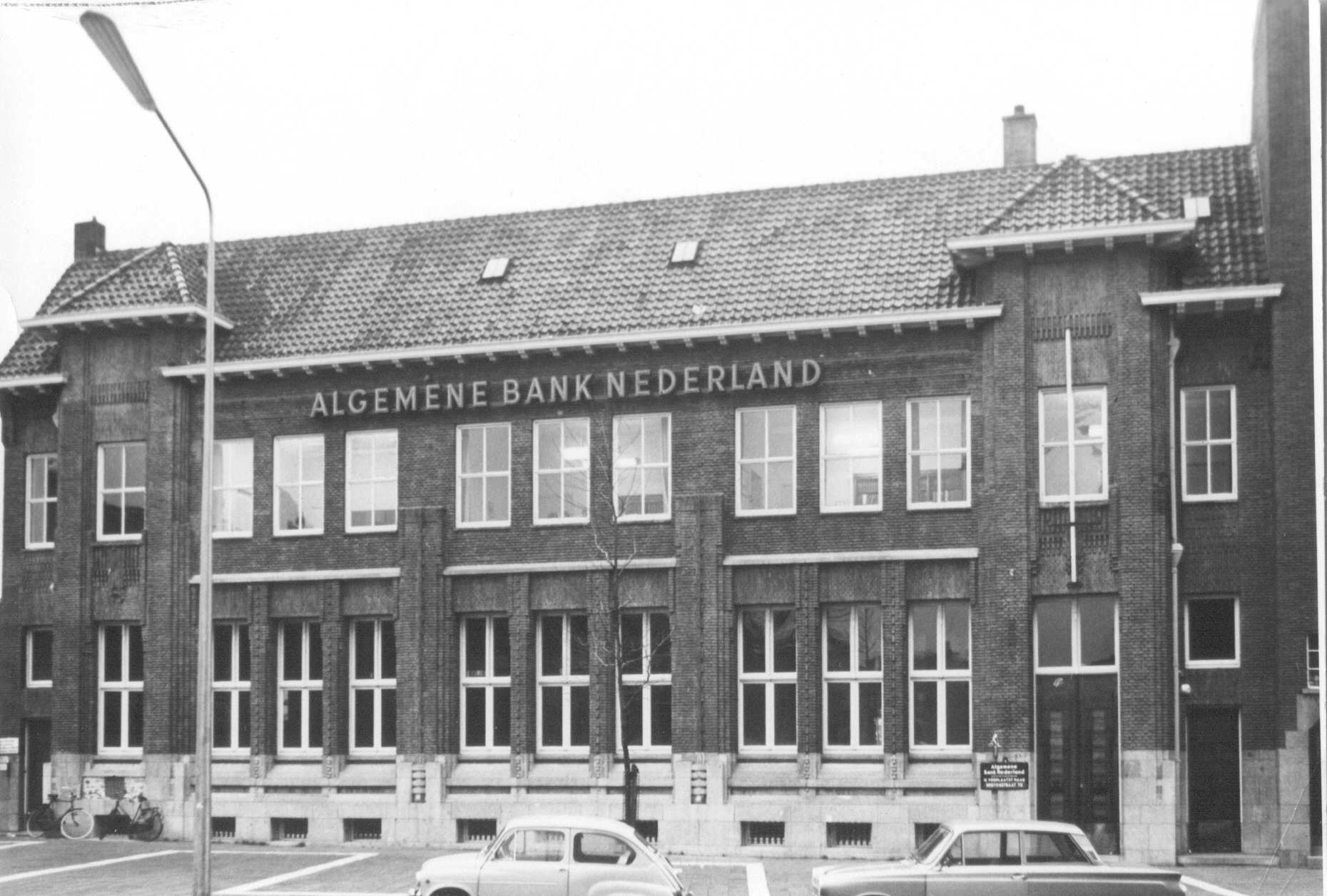 De Algemene Bank Nederland aan het Mariënburg